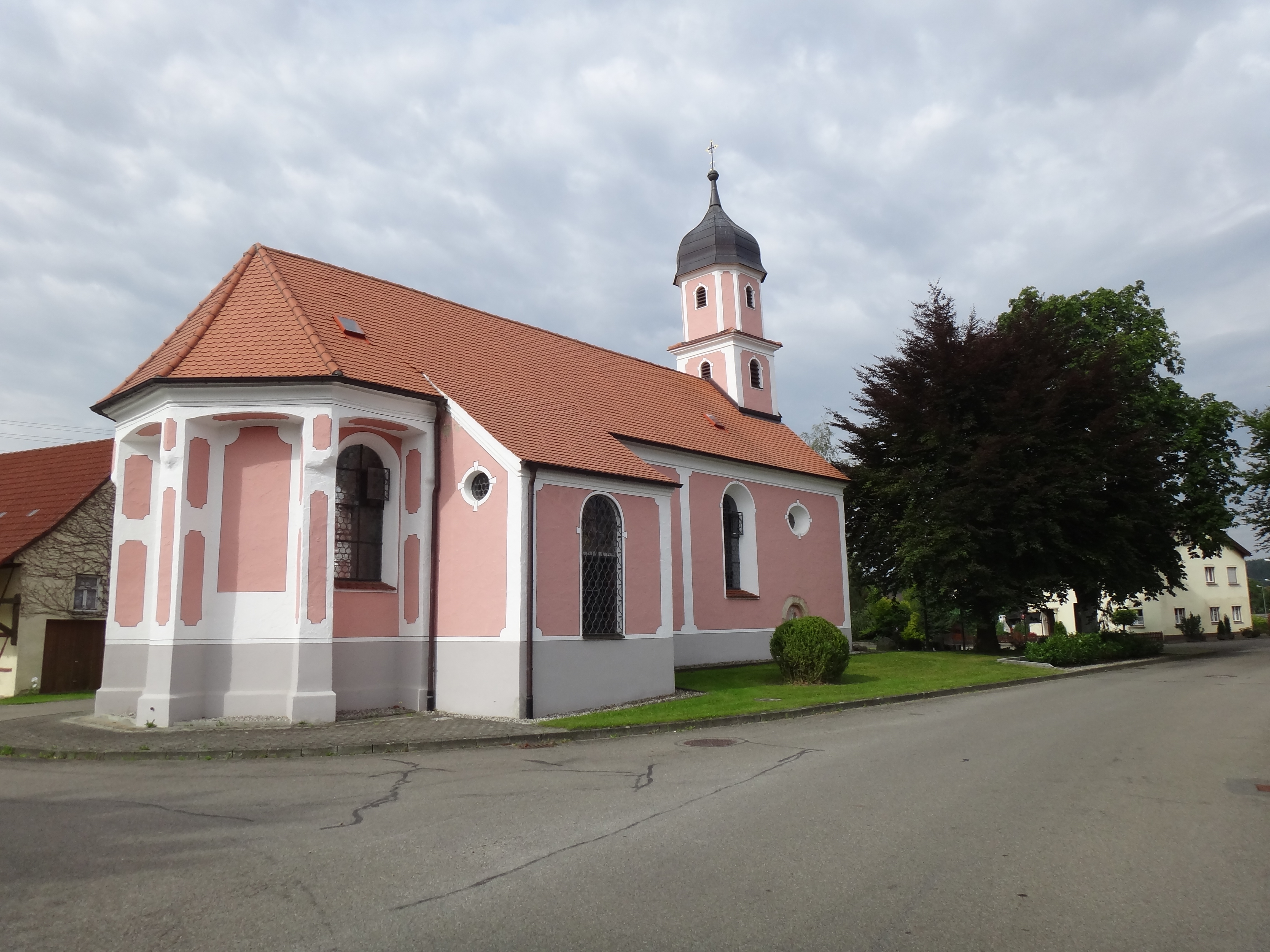 Pfarrkirche St. Michael (Sinningen)